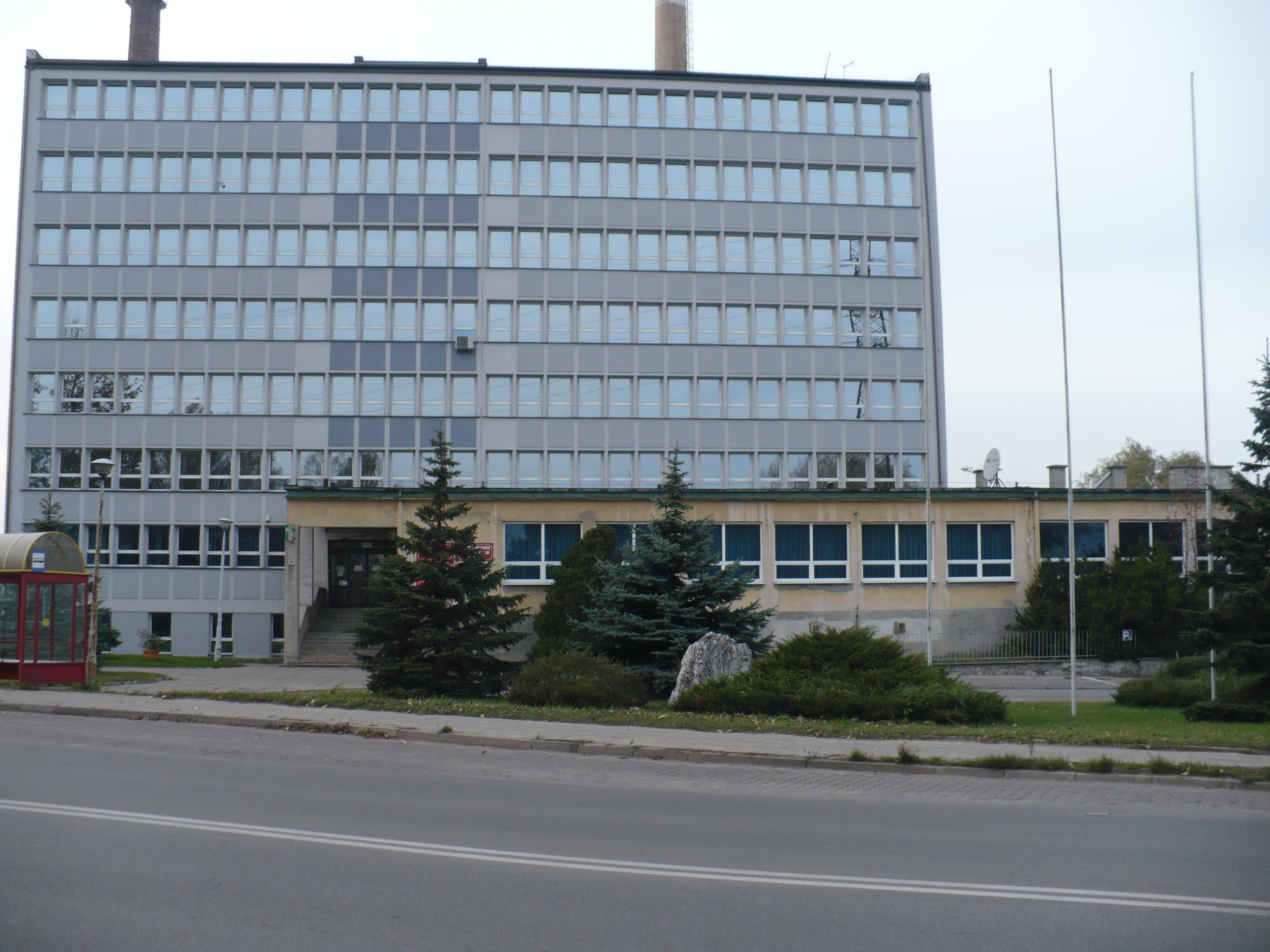 Budynek Starostwa powiatu myszkowskiego